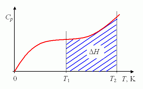 A hőkapacitás hőmérséklet-függése